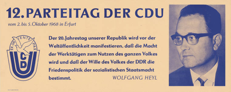 12. Parteitag der CDU ... Der 20. Jahrestag unserer Republik wird vor der Weltöffentlichkeit manifestieren, ... daß der Wille des Volkes der DDR die Friedenspolitik der sozialistischen Staatsmacht bestimmt. Wolfgang Heyl Abbildung: Parteilogo - Porträtfoto Wolfgang Heyl Plakatart: Kandidaten-/Personenplakat mit Porträt Drucker_Druckart_Druckort: III-9-19 Ag 224-100-68 7265 Objekt-Signatur: 10-024 : 3085 Bestand: Plakate aus der SBZ/DDR (10-024) GliederungBestand10-18: Ost-CDU / CDUD / Exil-CDU Lizenz: KAS/ACDP 10-024 : 3085 CC-BY-SA 3.0 DE